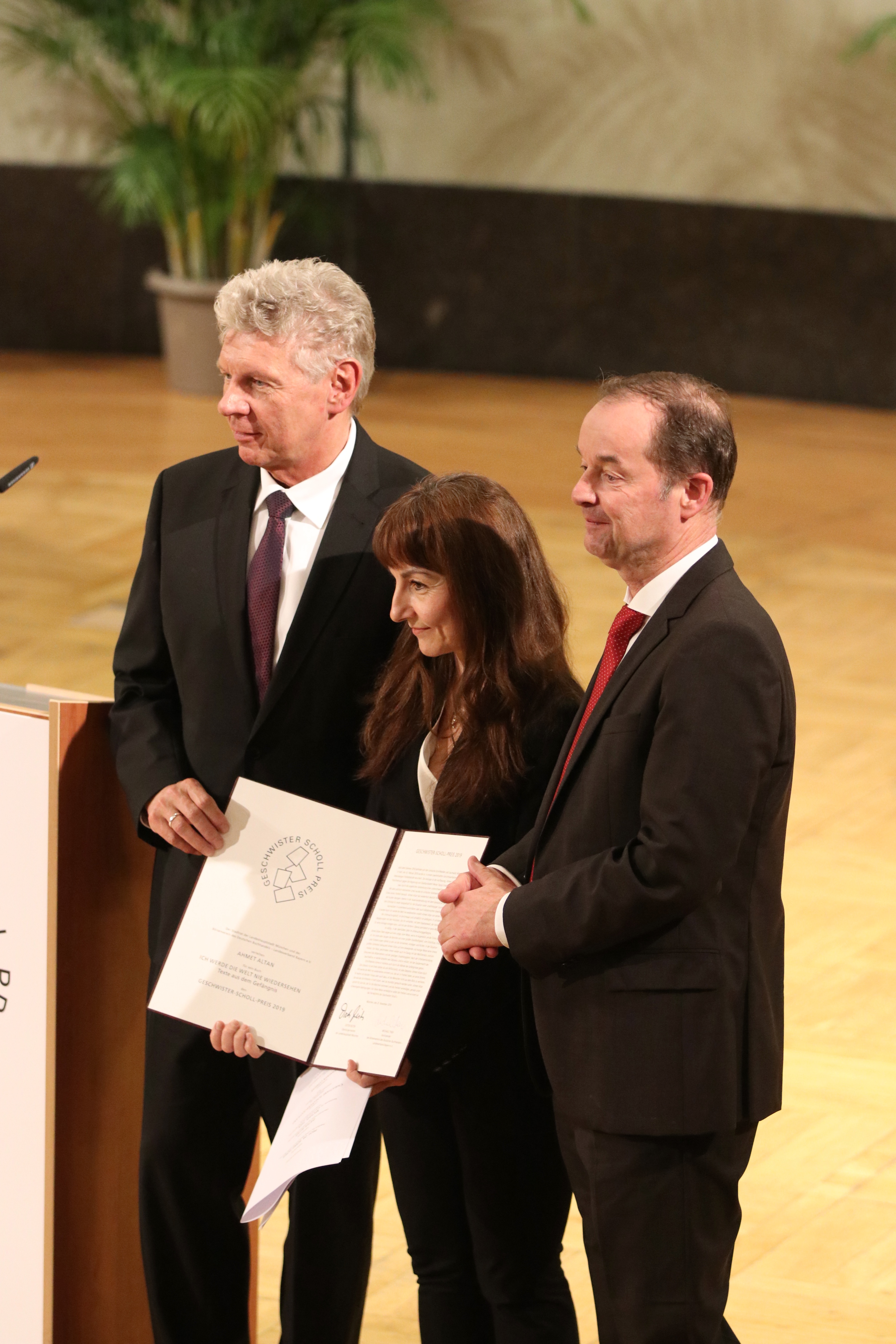 Verleihung des Geschwister-Scholl-Preises 2019 an Ahmet Altan, der nicht anwesend sein kann, da er in der Türkei in Haft genommen wurde. (v. links:) Münchner Oberbürgermeister Dieter Reiter, Journalisten und Schriftstellerin Yasemin Çongar (die den Preis für Ahmet Altan in Empfang nimmt), Michael Then, Vorsitzender des Börsenvereins des deutschen Buchhandels, Landesverband Bayern e. V.